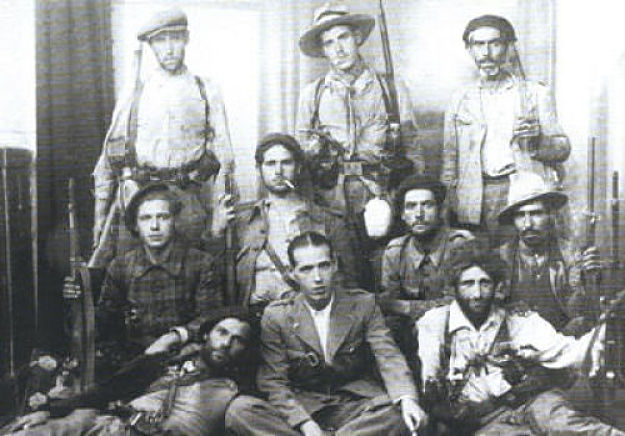 Mohamed Saïl (1894-1953) , militant anarchiste et anarcho-syndicaliste, en 1936 en Espagne (au premier rang, au milieu) avec des membres du Groupe international de la colonne Durruti.